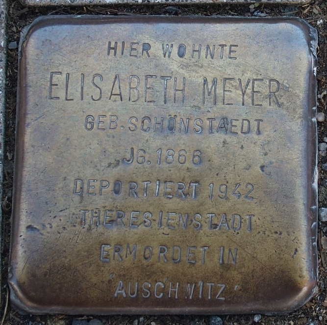 Stolperstein in Soest Thomästraße 20, Elisabeth Meyer